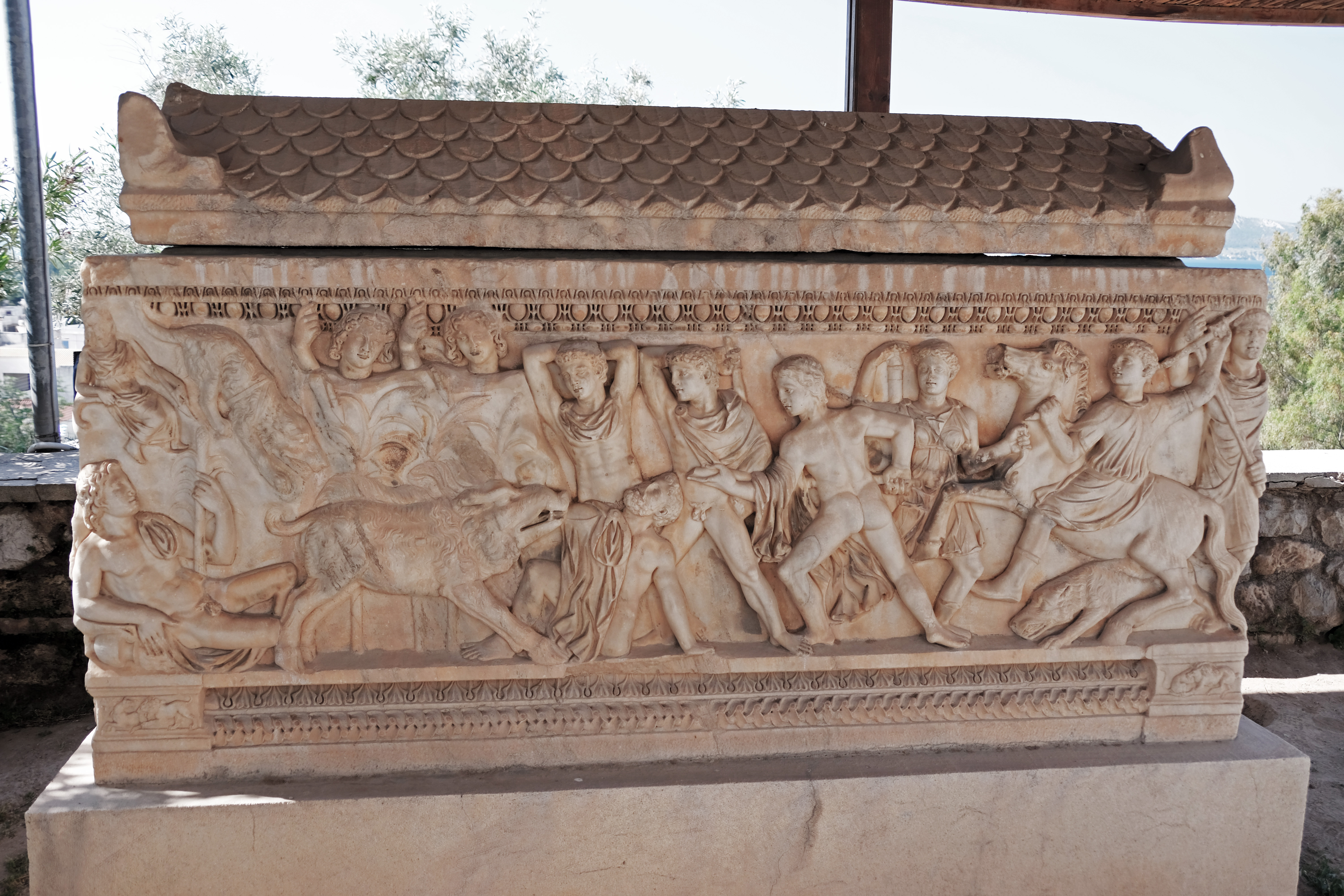 Sarcofago romano, Eleusi